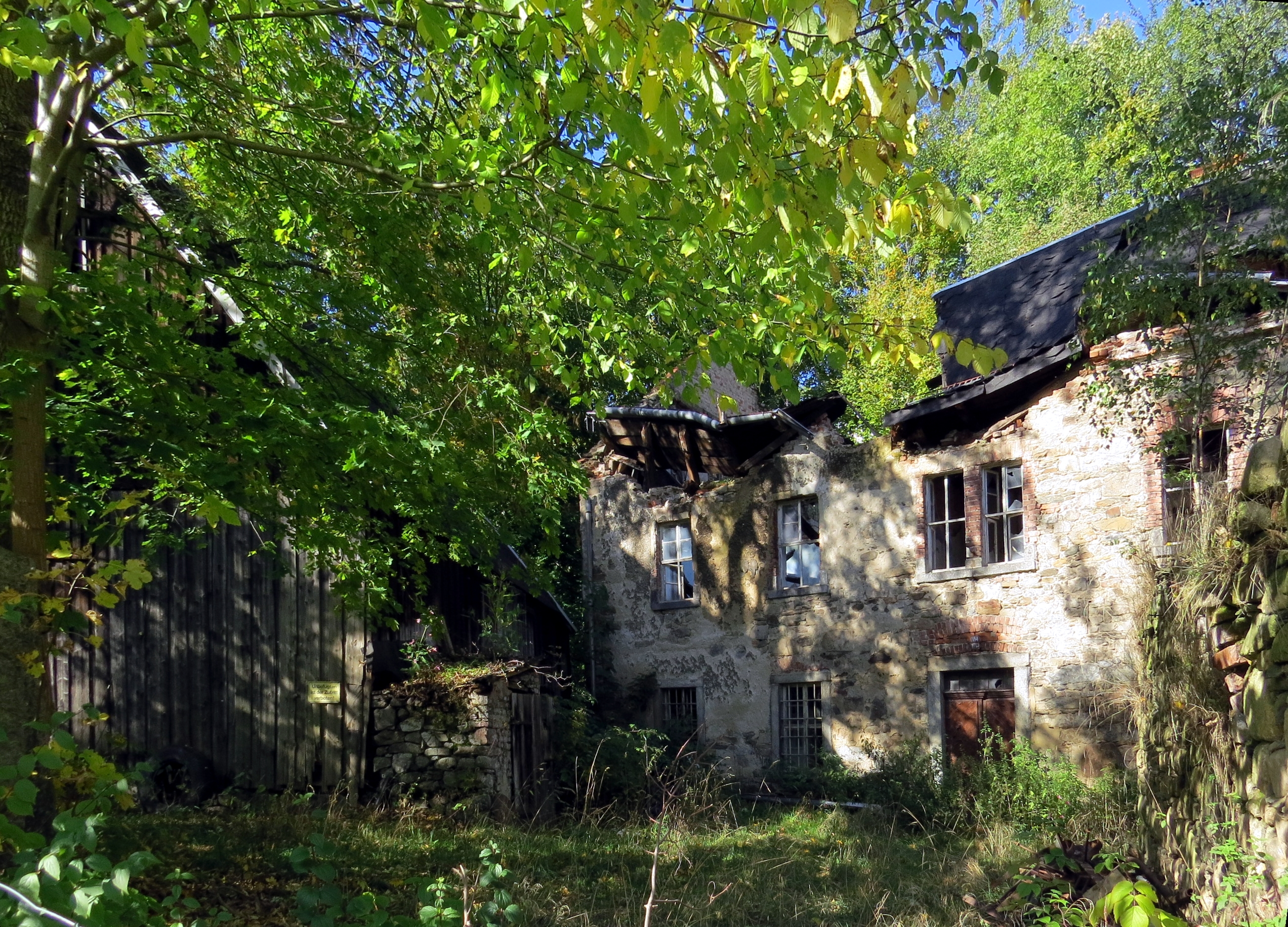 Zschorlauer Str., Gebäudereste auf der Fläche der eh. Tauschermühle, Aue